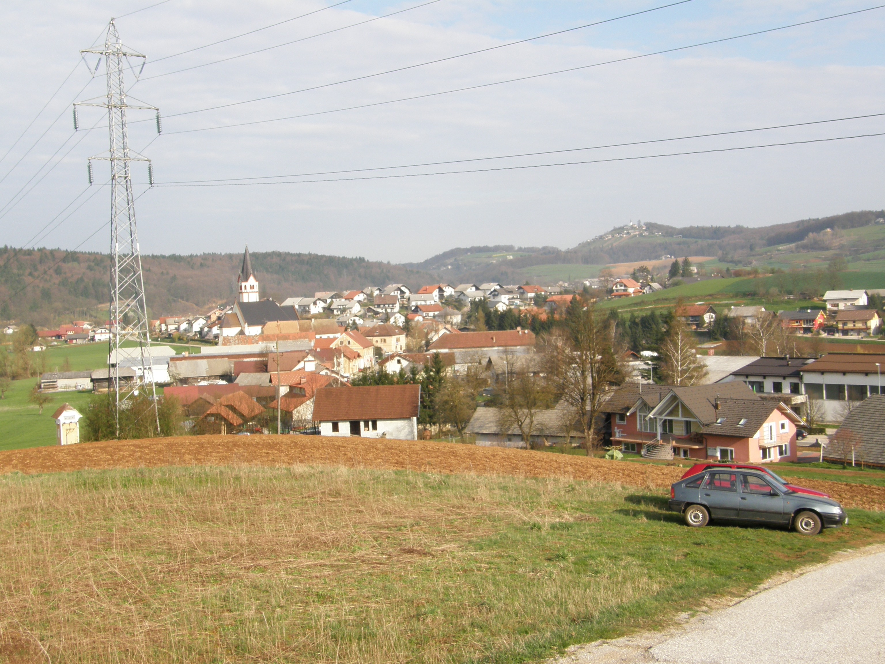 Mirna Peč, a village in Slovenia